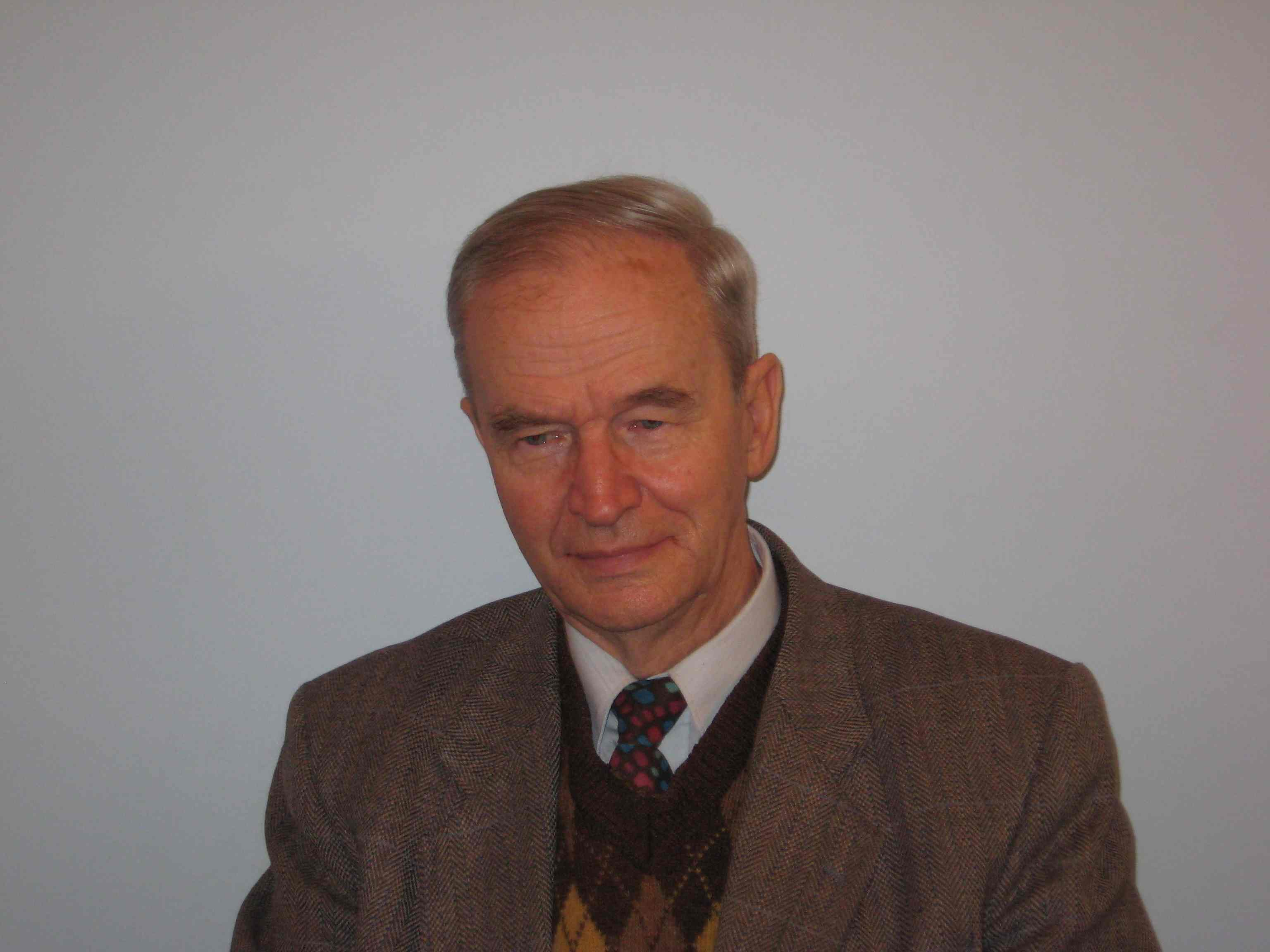 Rein Jürgensoni portree